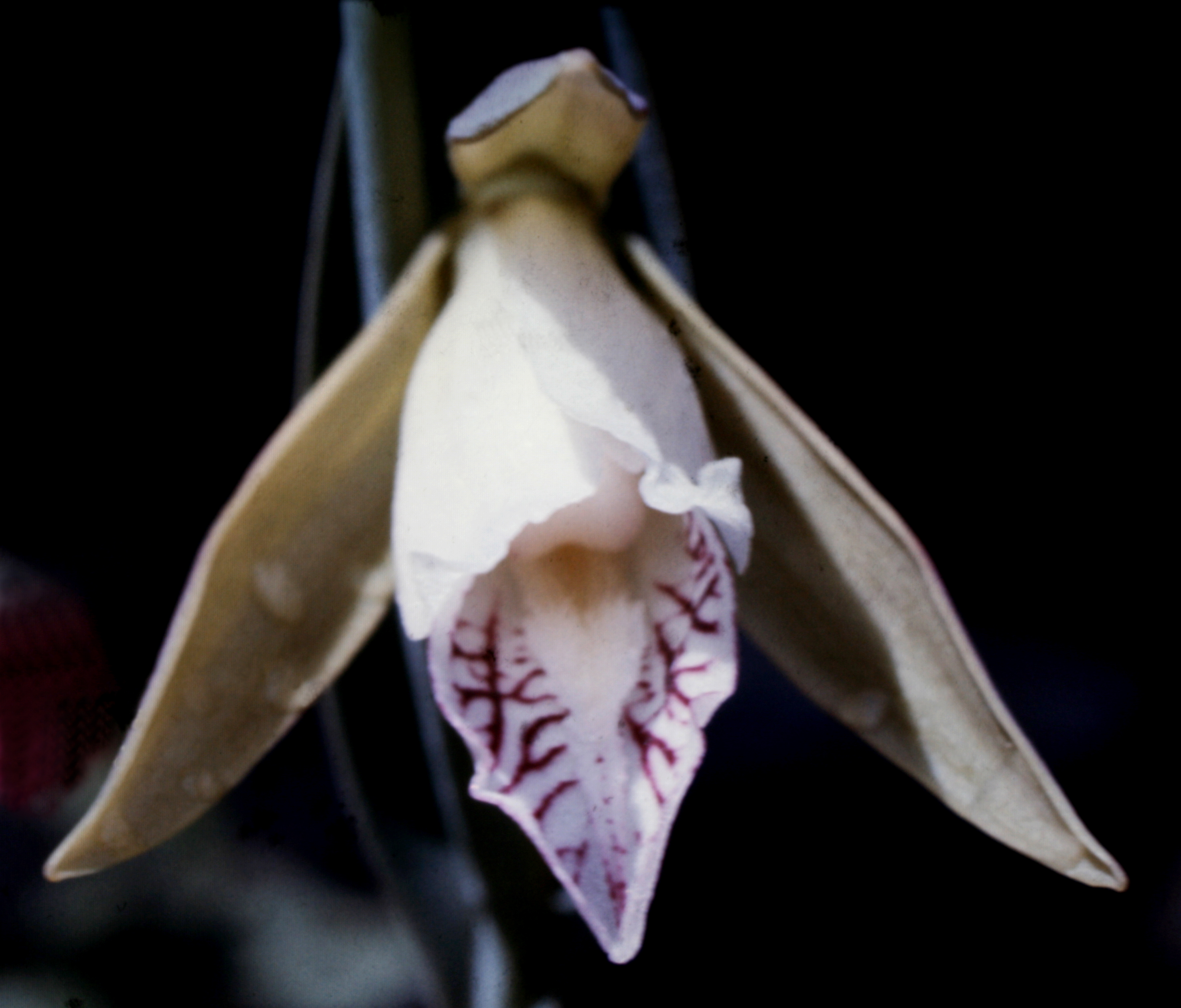 Cleistes rosea, Suriname.